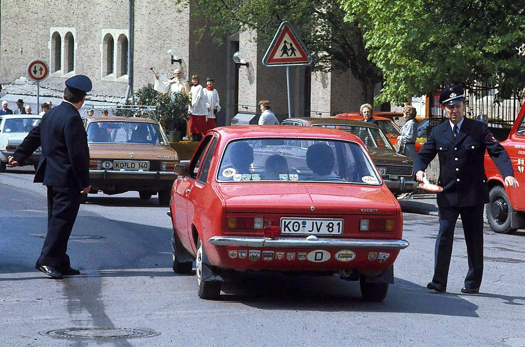 Fahrzeugsegnung 1977 in Mülheim-Kärlich, Pfarrkirche St. Mauritius Kärlich; Pfarrer Josef Schmitt mit Messdienern, Ordner Siegfried Krautkrämer (links) und Alex Stupplin (rechts)